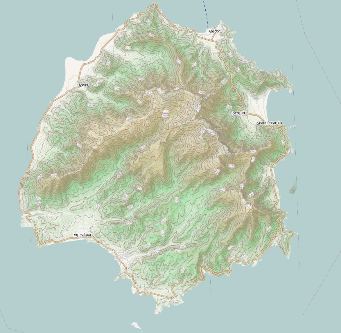 Τοπογραφικός χάρτης της Θάσου